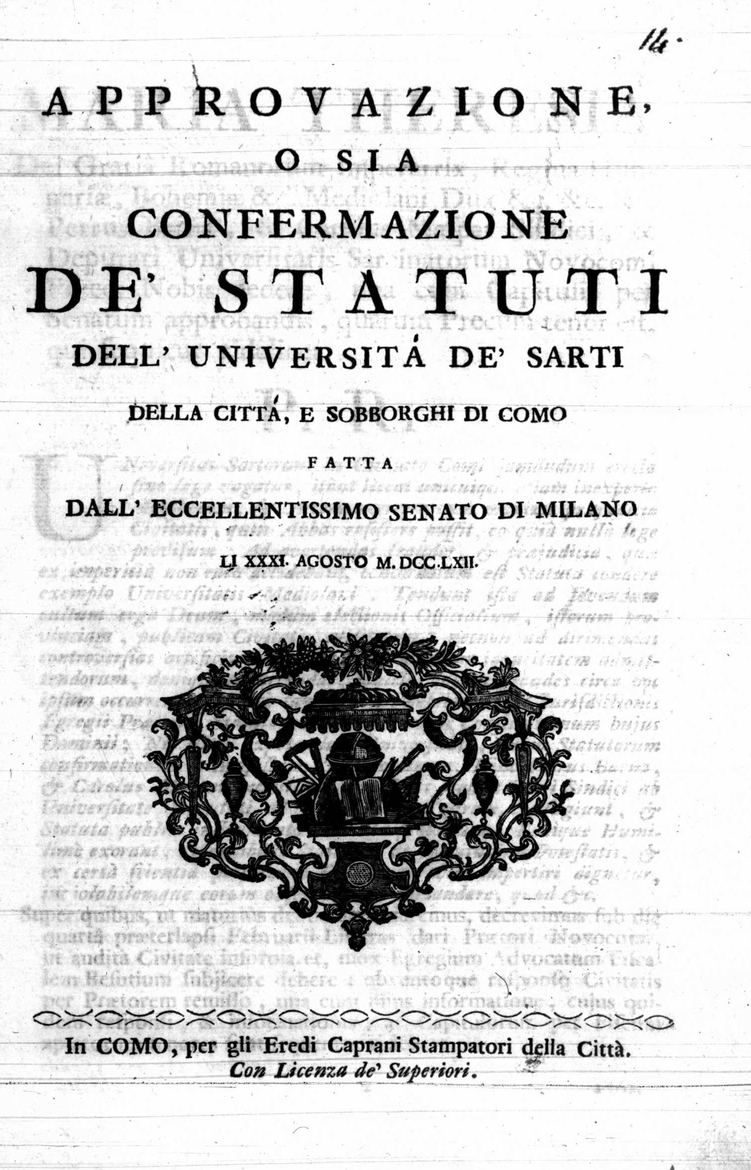 Frontespizio